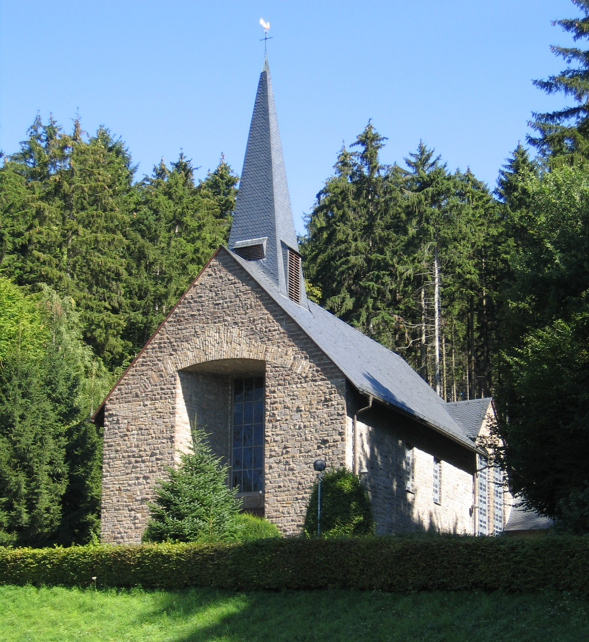 Katholische Pfarrvikarie Maria Königin des Friedens in Menden-Oberrödinghausen.